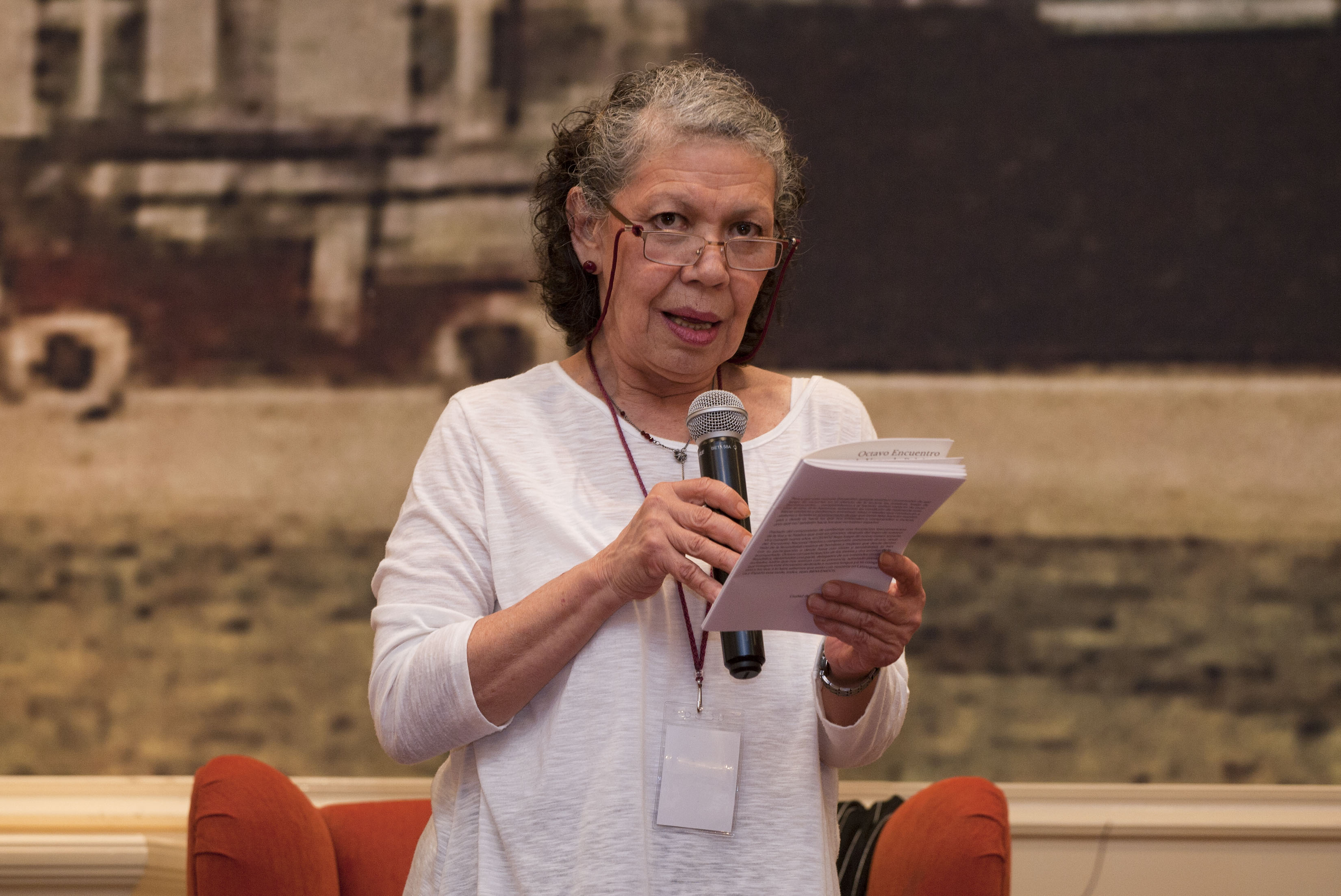 Lunes, 3 de Agosto 2015. Como parte de sus actividades de trabajo el Secretario de Cultura, Eduardo Vázquez Martín, inauguro el Octavo Encuentro Nacional de la Voz y la Palabra. Palabra y Comprensión, Entramado de paz, que organiza el Centro de Estudios para el Uso de la Voz, que dirige la actriz Luisa Huertas. Foto: Antonio Nava / Secretaria de Cultura Ciudad de México.